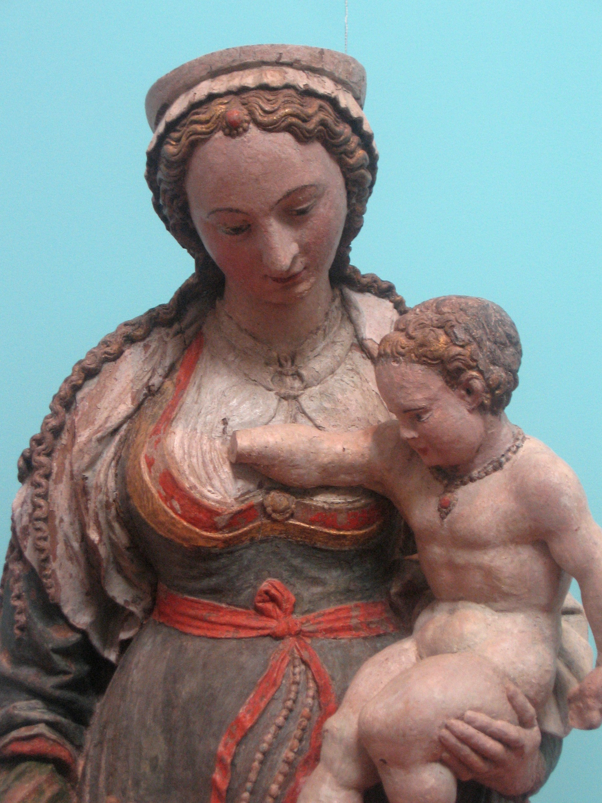 Exposition "Le Beau XVIe siècle". Vierge à l'Enfant Vers 1540 Statue, bois, polychromie. Rouilly-Sacey (Aube)